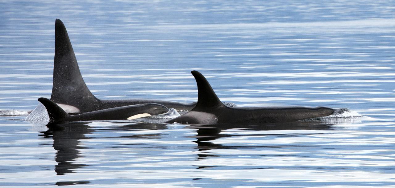 glacier bay